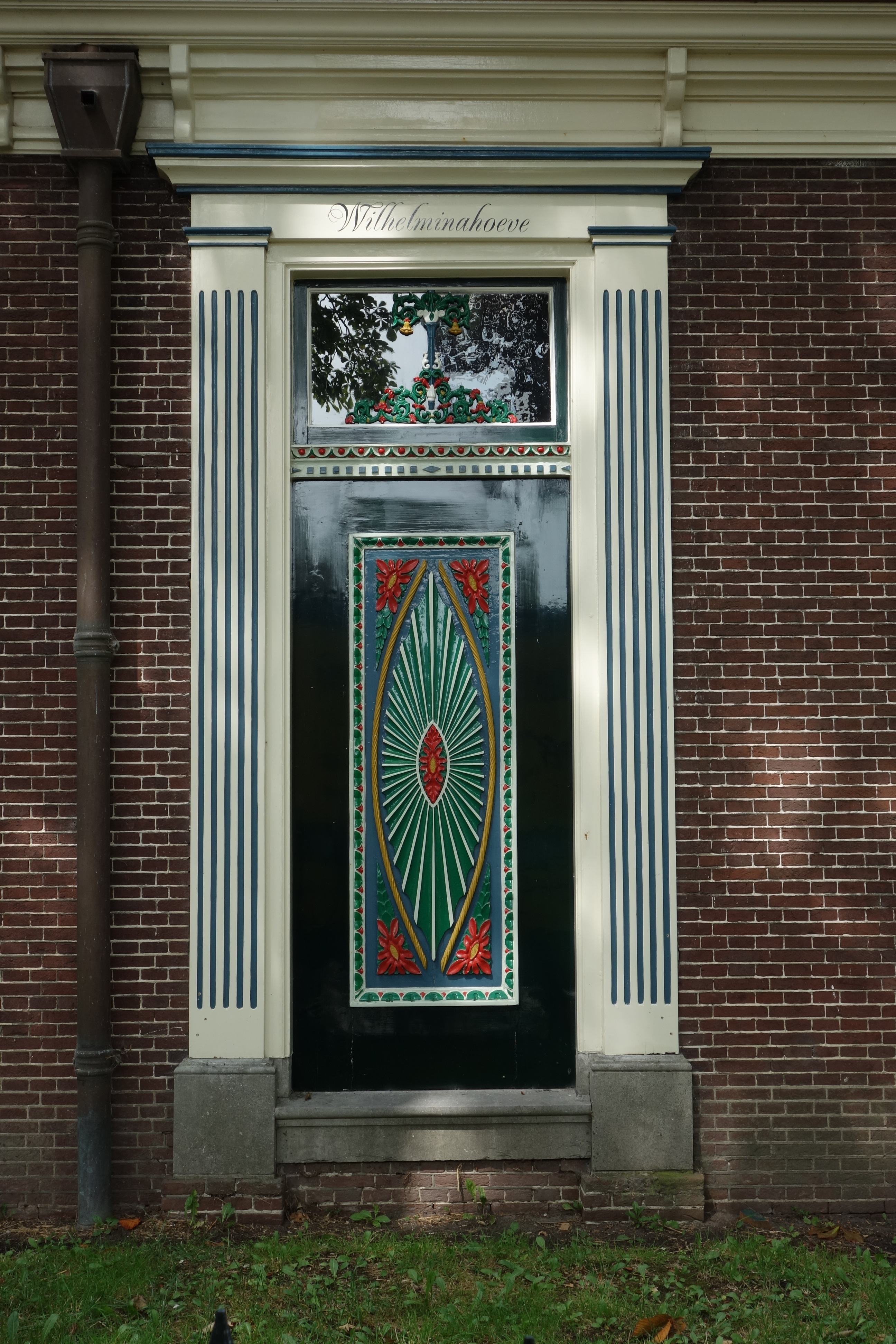 Rouw- en trouwdeur van de Wilhelminahoeve in Westwoud.